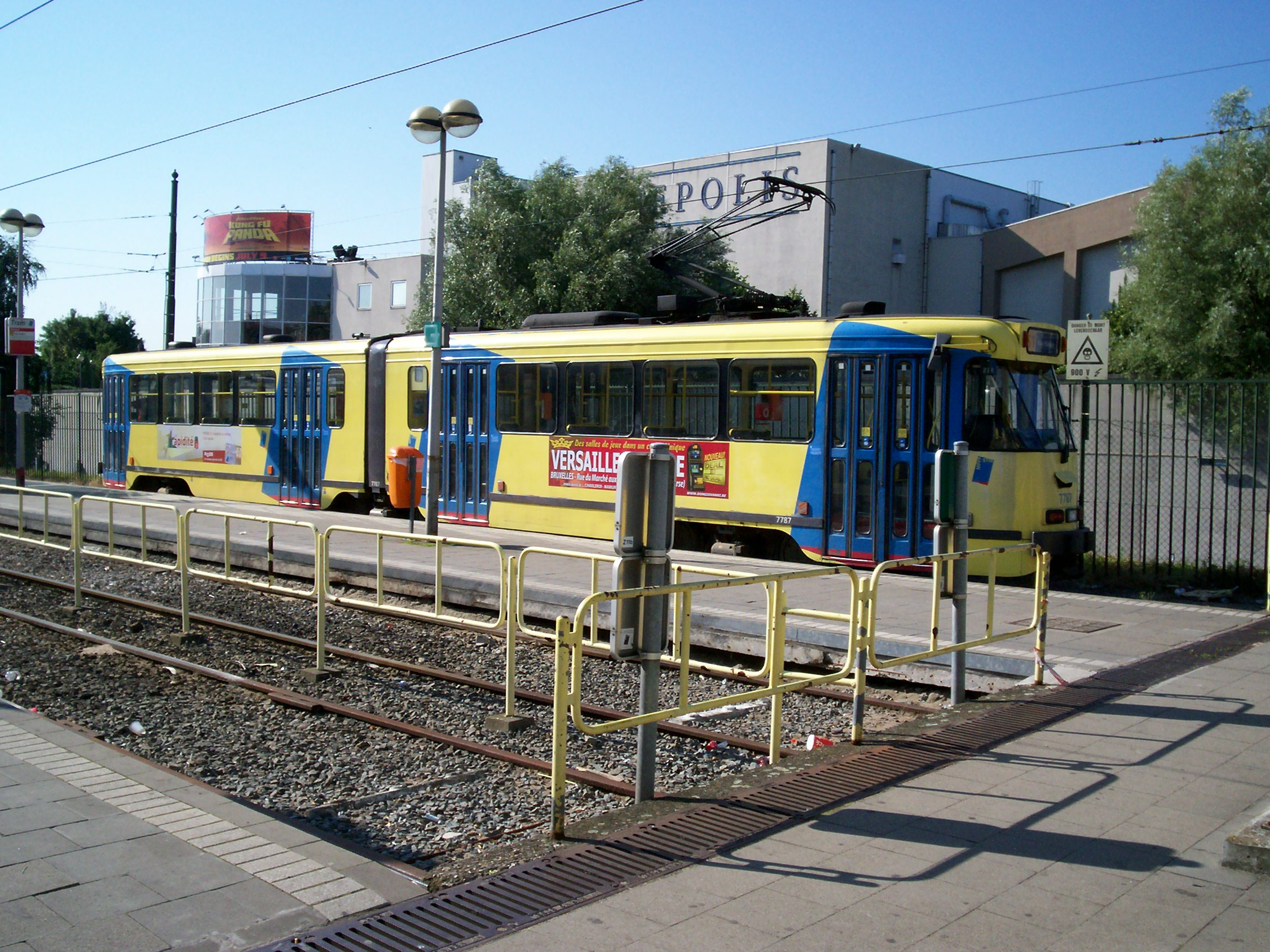 Vue générale d'un PCC 7700 de la ligne 51 à Heysel